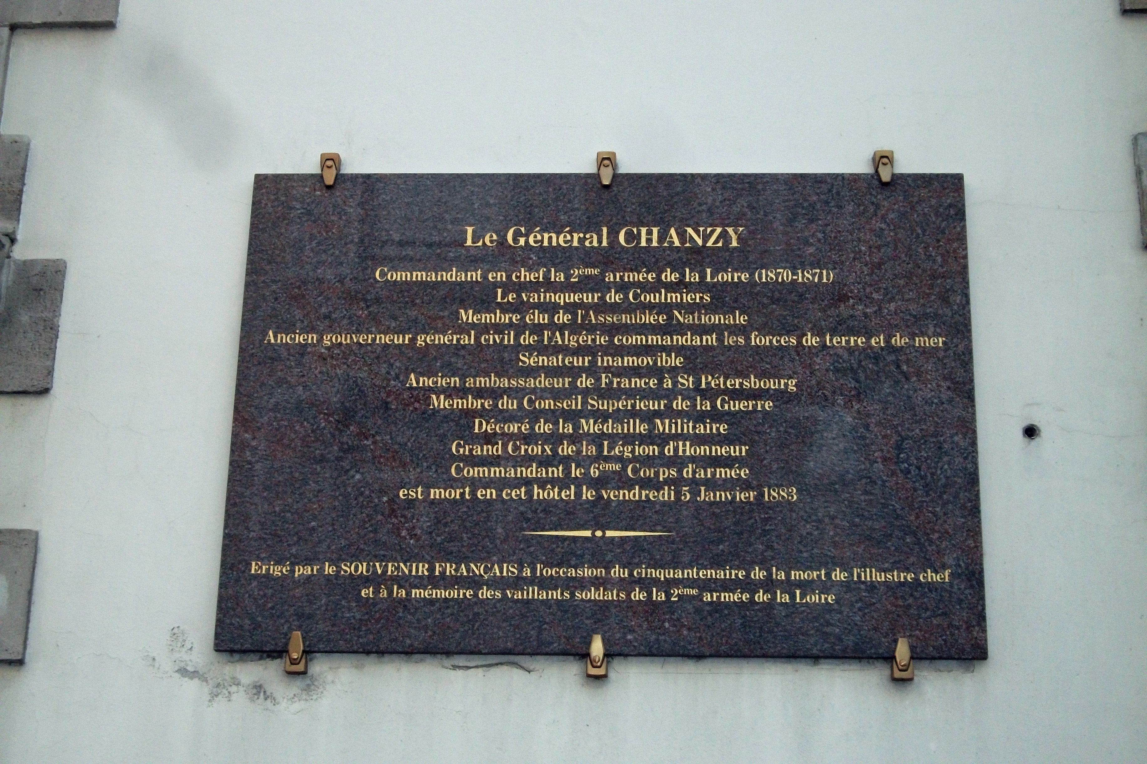 Plaque commémorative du Souvenir français en l'honneur du général Chanzy.